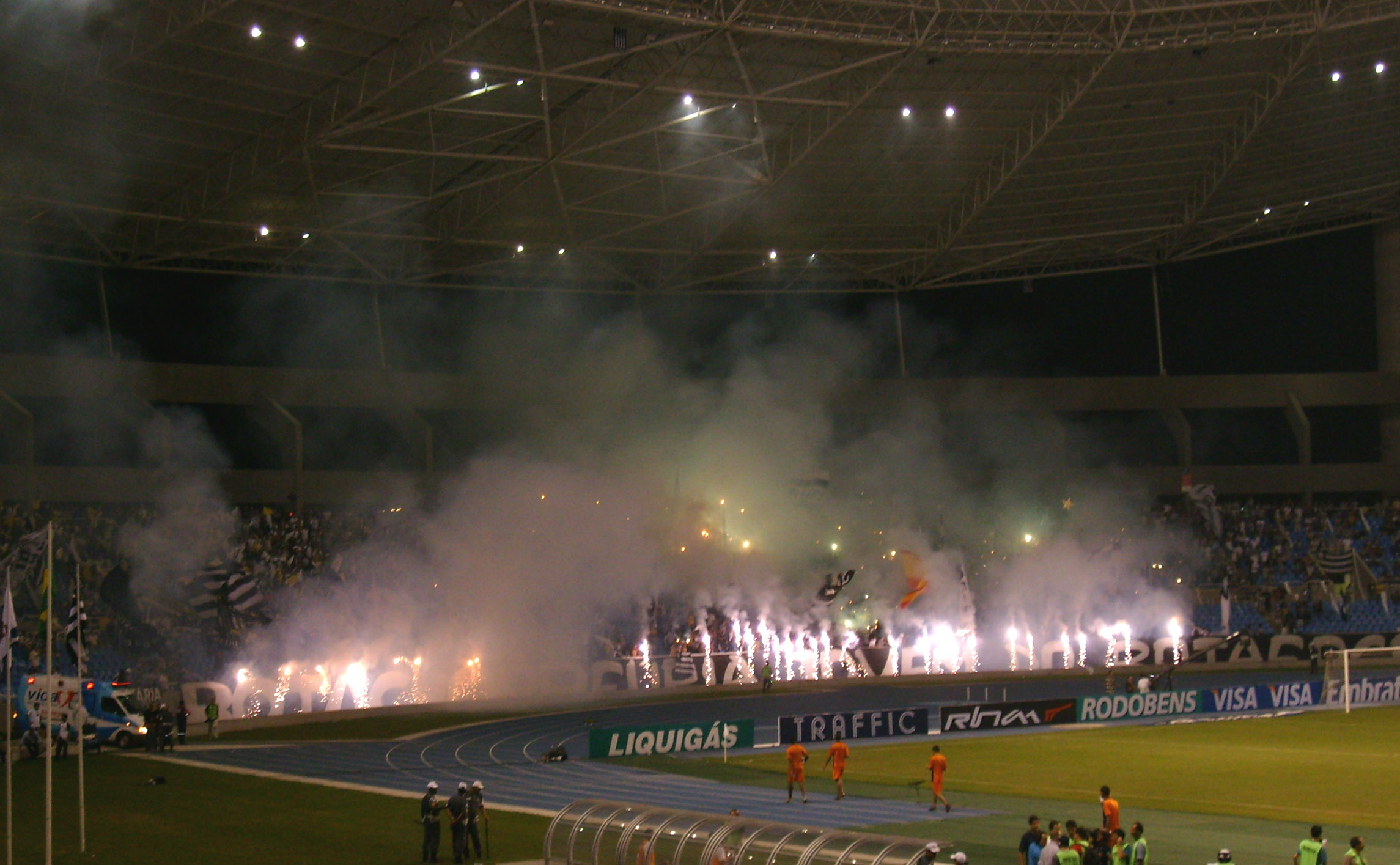 Fúria Jovem do Botafogo, torcida organizada, recebe o Botafogo FR na partida contra o Corinthians, válida pelo primeiro jogo semifinal da Copa do Brasil de 2008, em 20 de maio deste ano, no Engenhão.